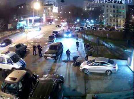 Это произведение находится в общественном достоянии, поскольку в соответствии с ГК РФ, автором результата интеллектуальной деятельности может считаться лицо, чьим творческим трудом создано произведение. Данный кадр является результатом исключительно автоматической записи, без участия автора-человека, вложившего творческий труд. У произведения отсутствует автор, а значит неприменимы и авторские права..